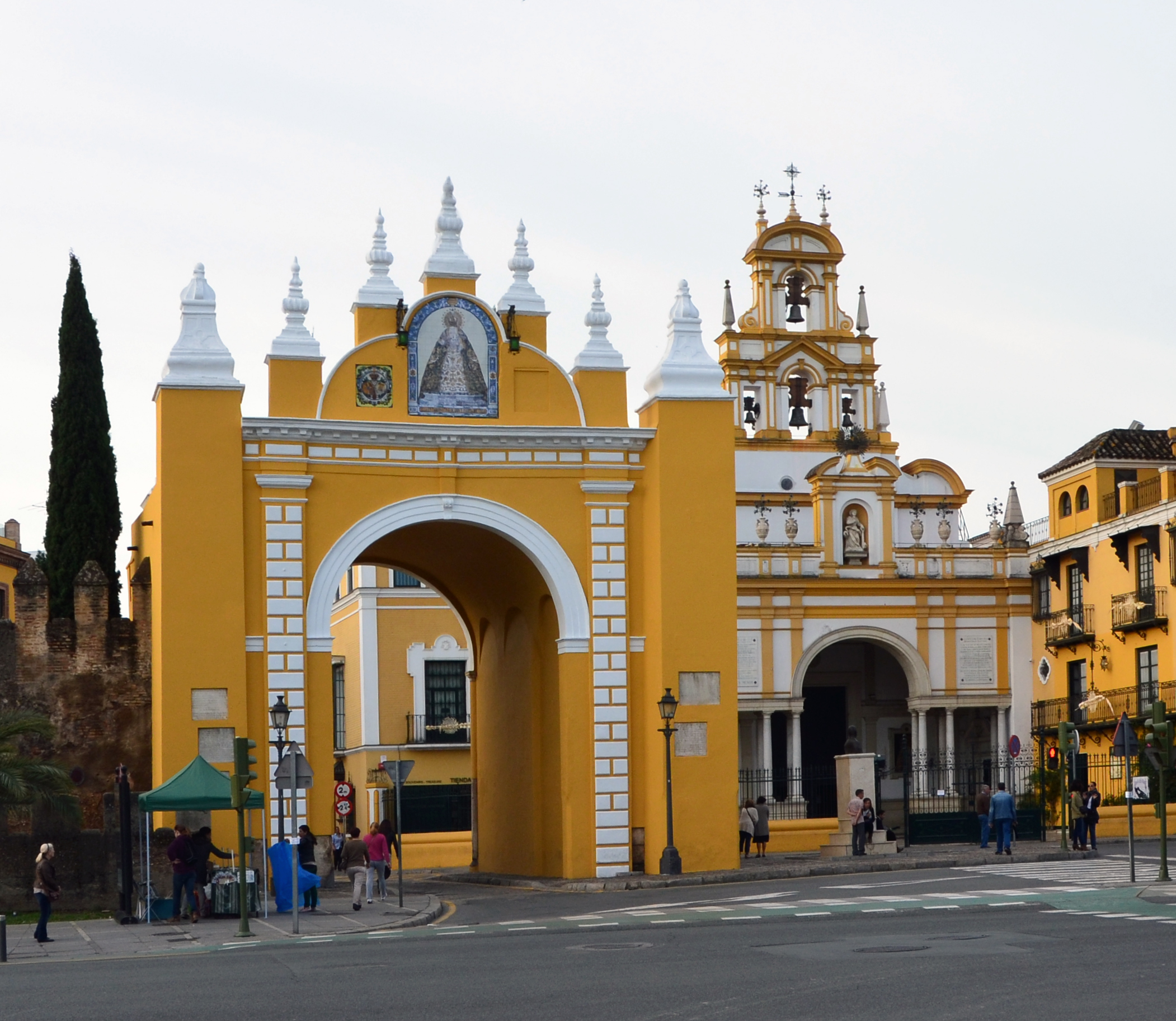 La porte de la Macarena de Séville (Espagne). Située devant la basilique homonyme, elle est d'origine almoravide et a été reconstruite en 1723 et en 1795. Cette porte est la plus grande des portes de la ville et se trouve sur la rue Don Fadrique, au nord de l'enceinte.